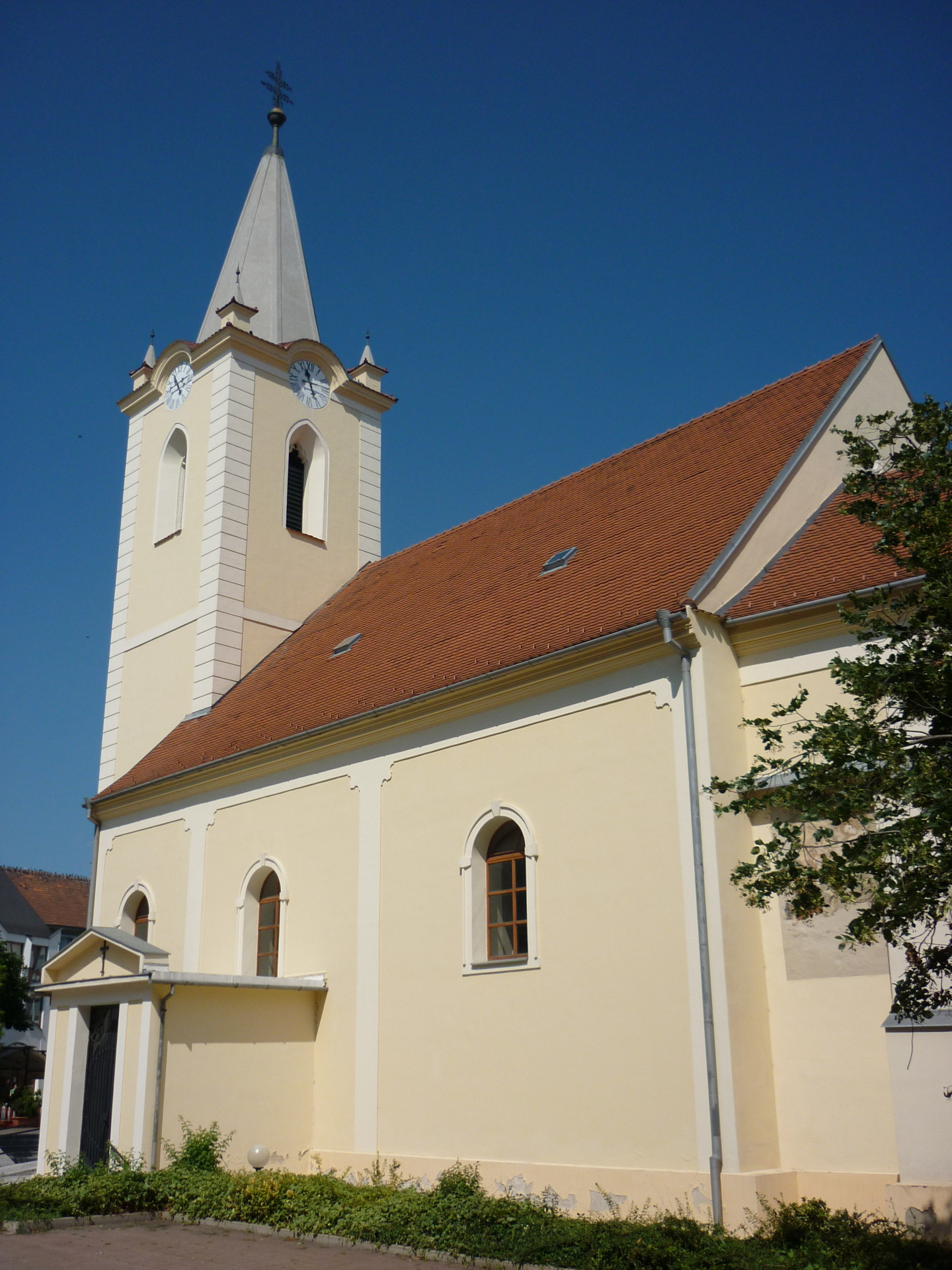 Dunajská Streda